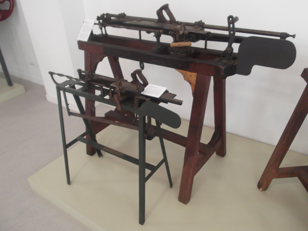 Màquina de ribot i màquina de carrar